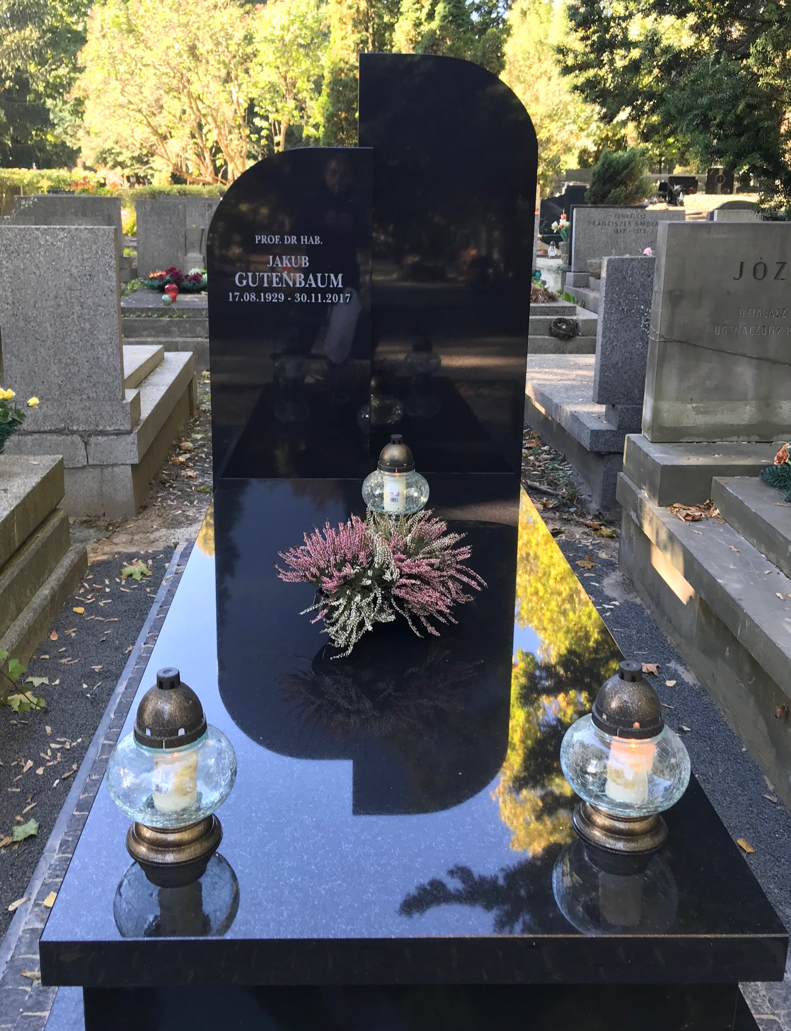 Grób Jakuba Gutenbauma na Cmentarzu Wojskowym na Powązkach